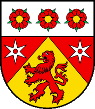 Wappen von Lully (Neu) Kanton Freiburg Schweiz